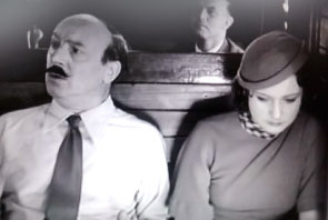 Cesare Zoppetti e Maria Denis in "Treno popolare" (Matarazzo, 1933)